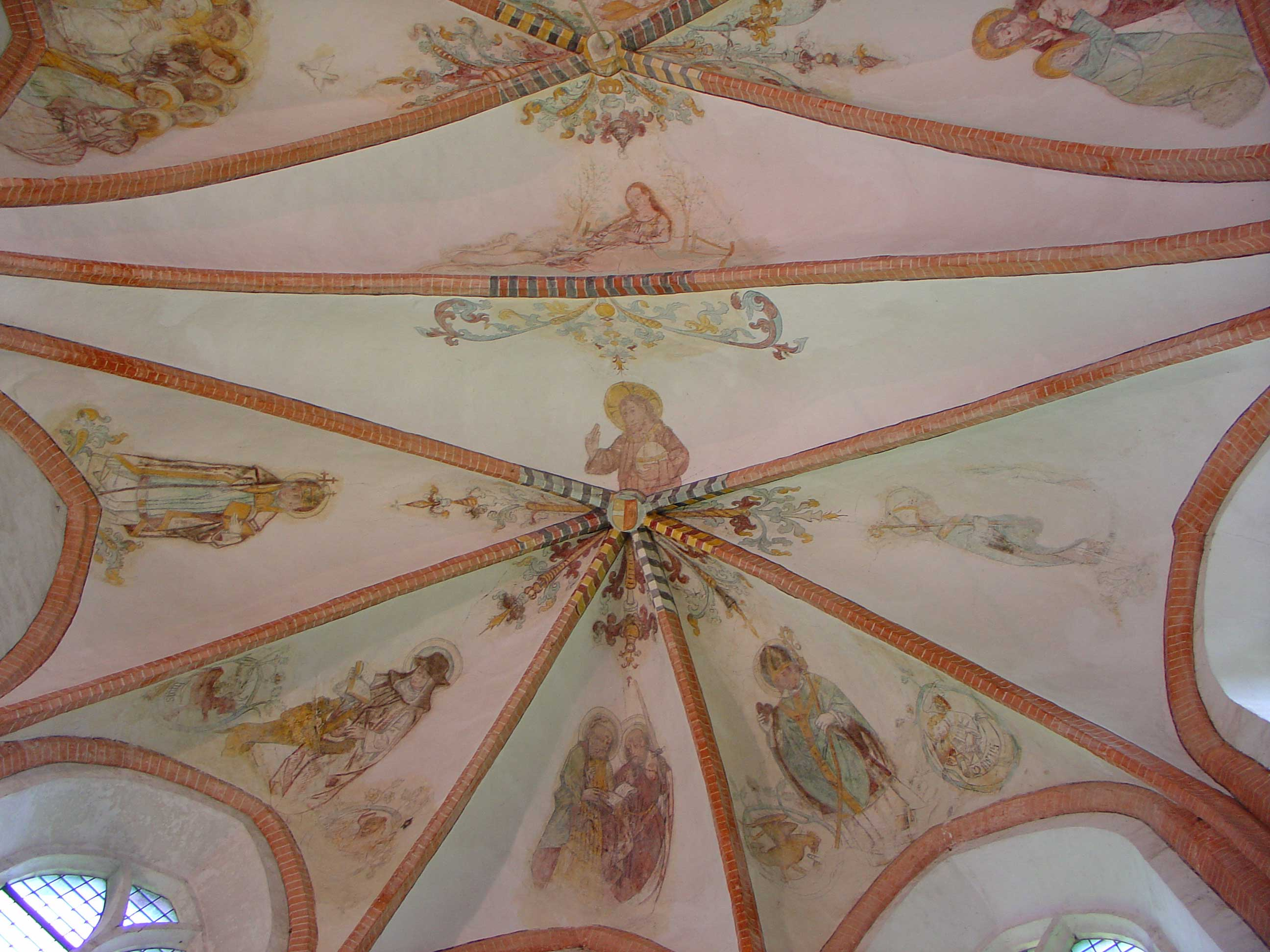 plafondschilderingen van de Petrus- en Pauluskerk te Loppersum